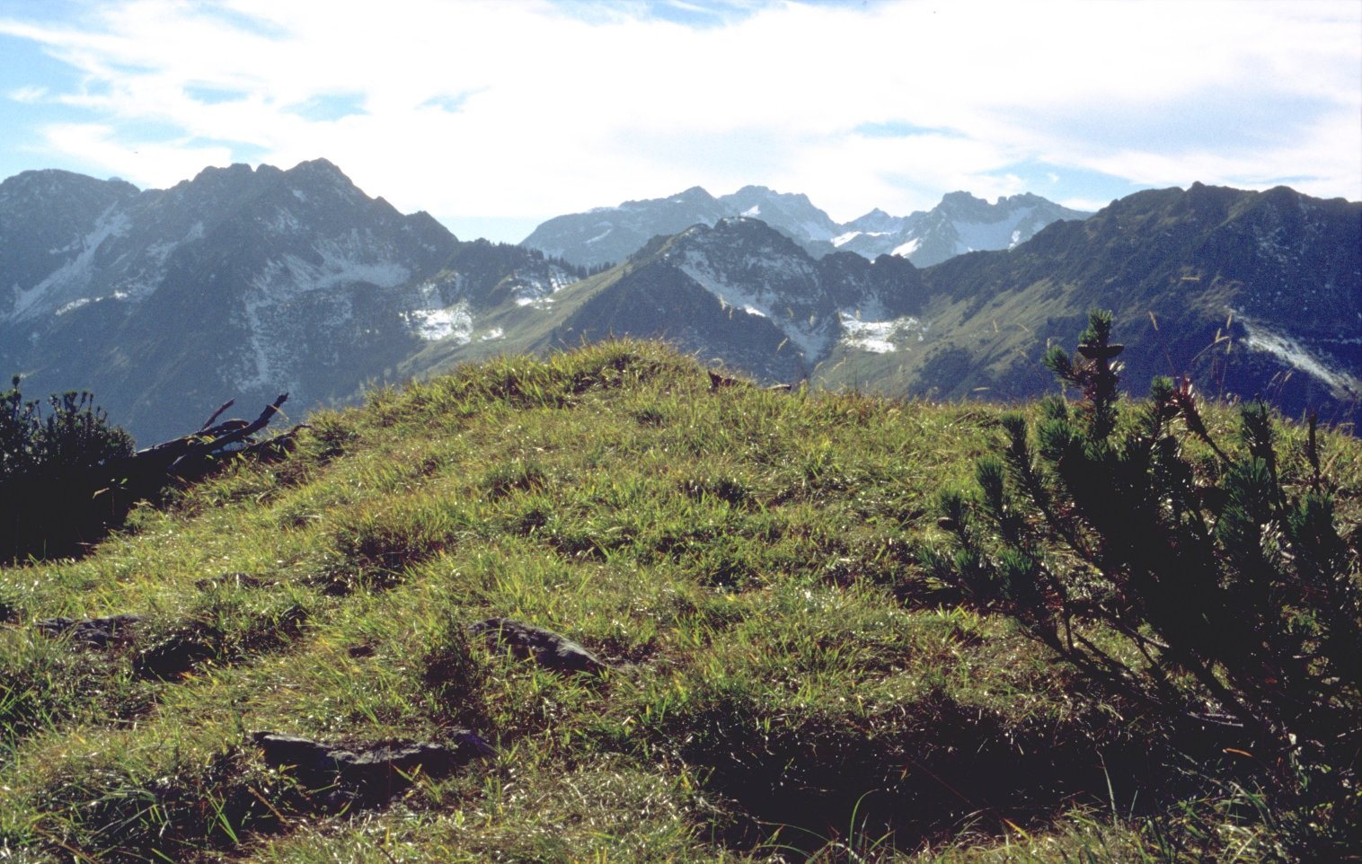 Himmelschrofenzug vom Aelpelekopf